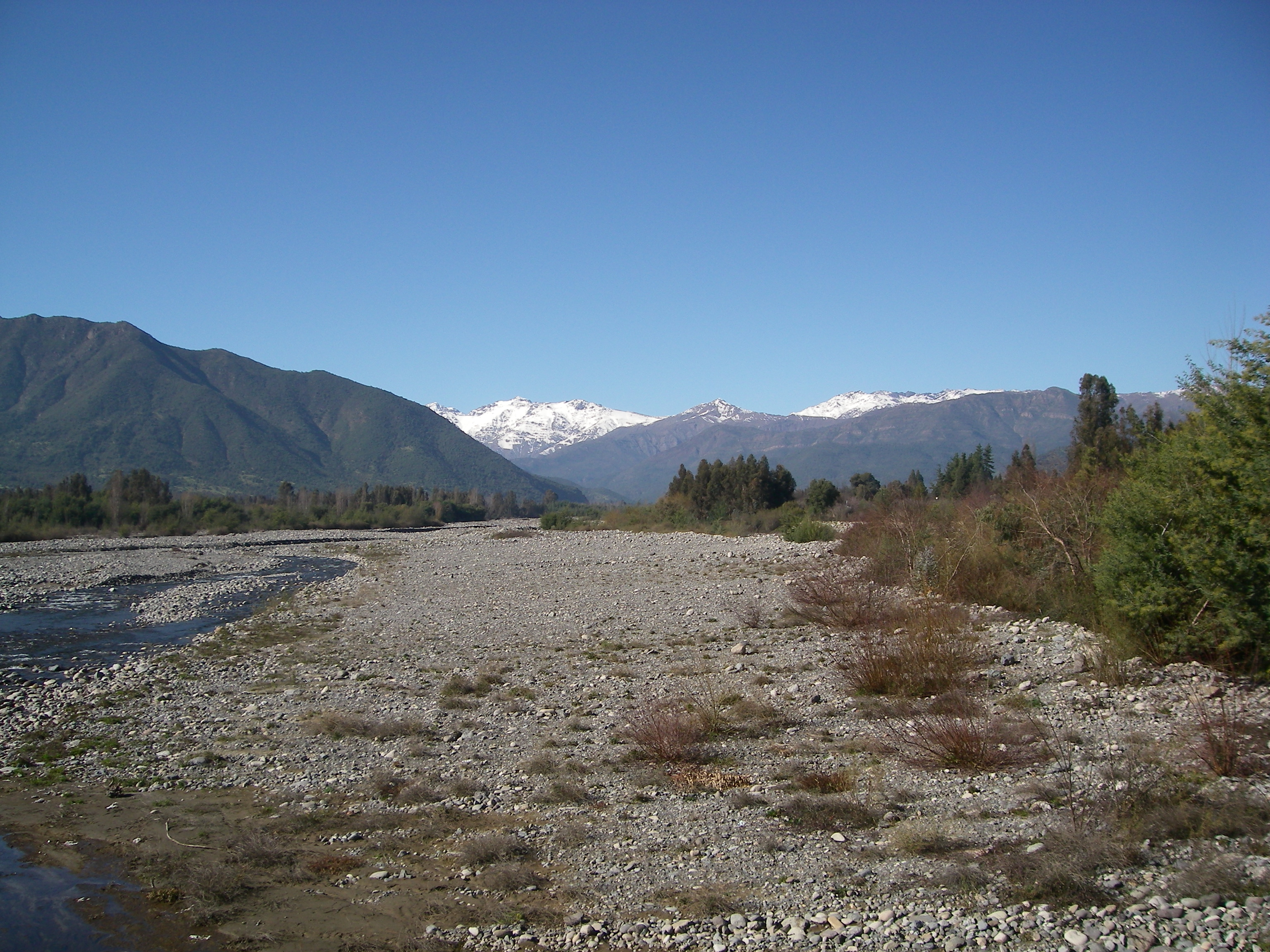 Popeta desde el puente.